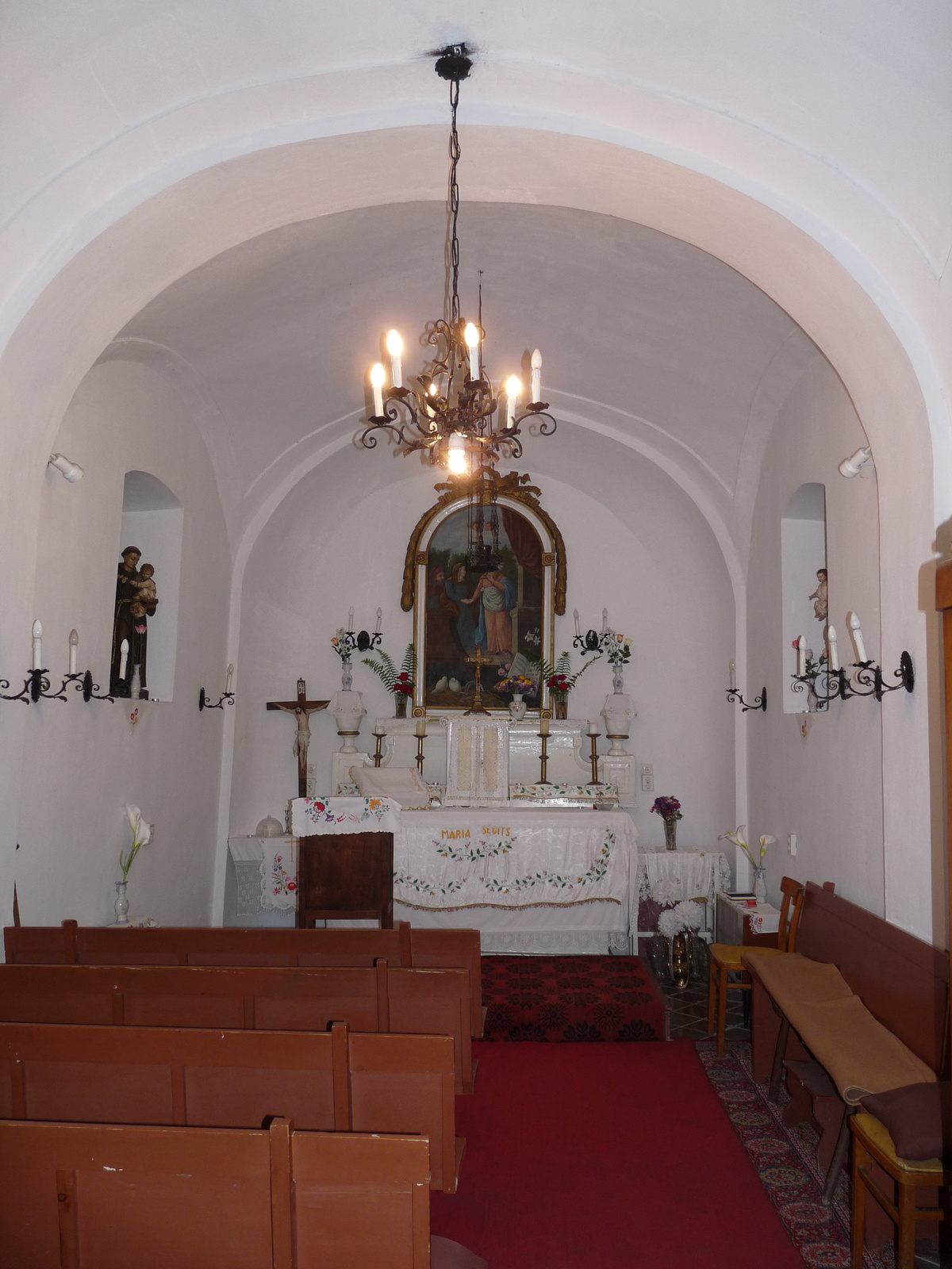 Gör. kat. kápolna (Sarlós Boldogasszony-kápolna) (Szolnok, Nyíl u.) This is a photo of a monument in Hungary. Identifier: 6049